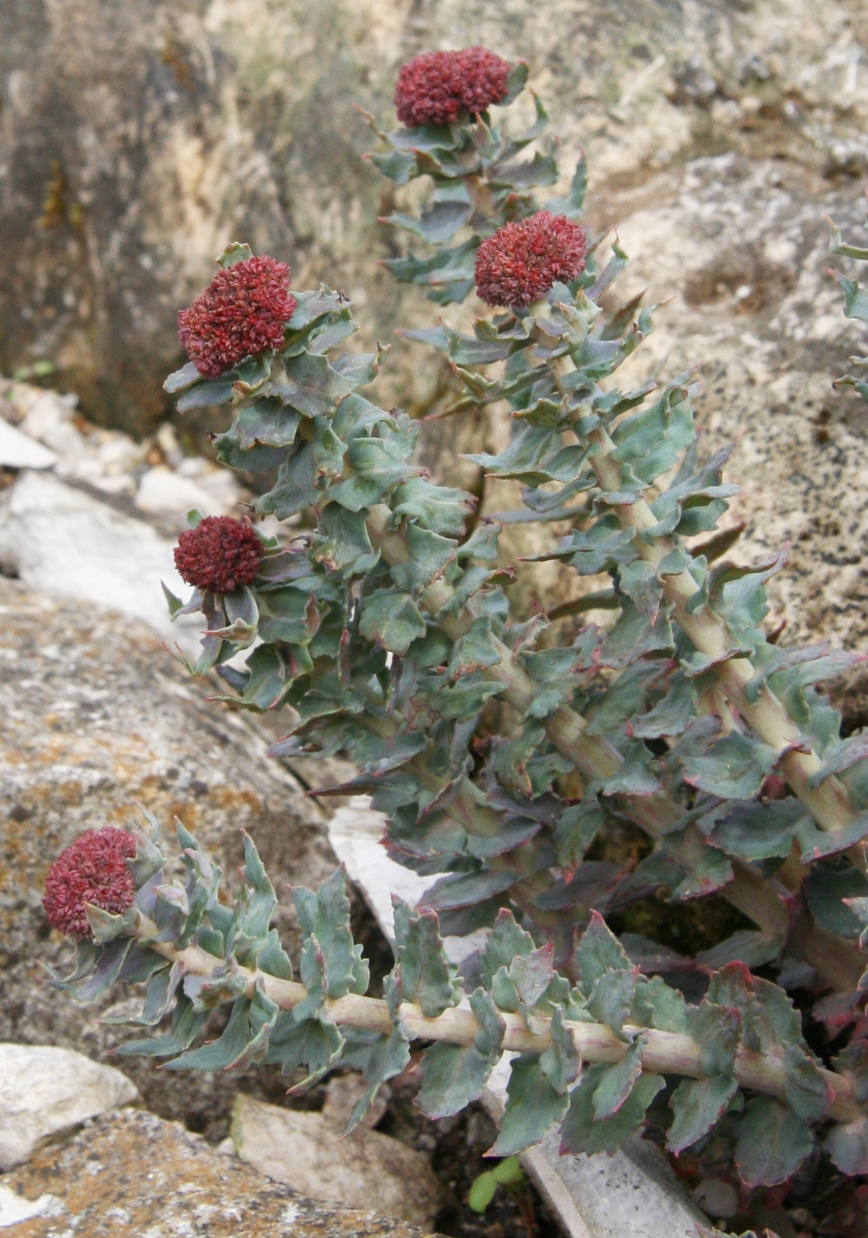 Rhodiola heterodonta im Botanischen Garten Erlangen